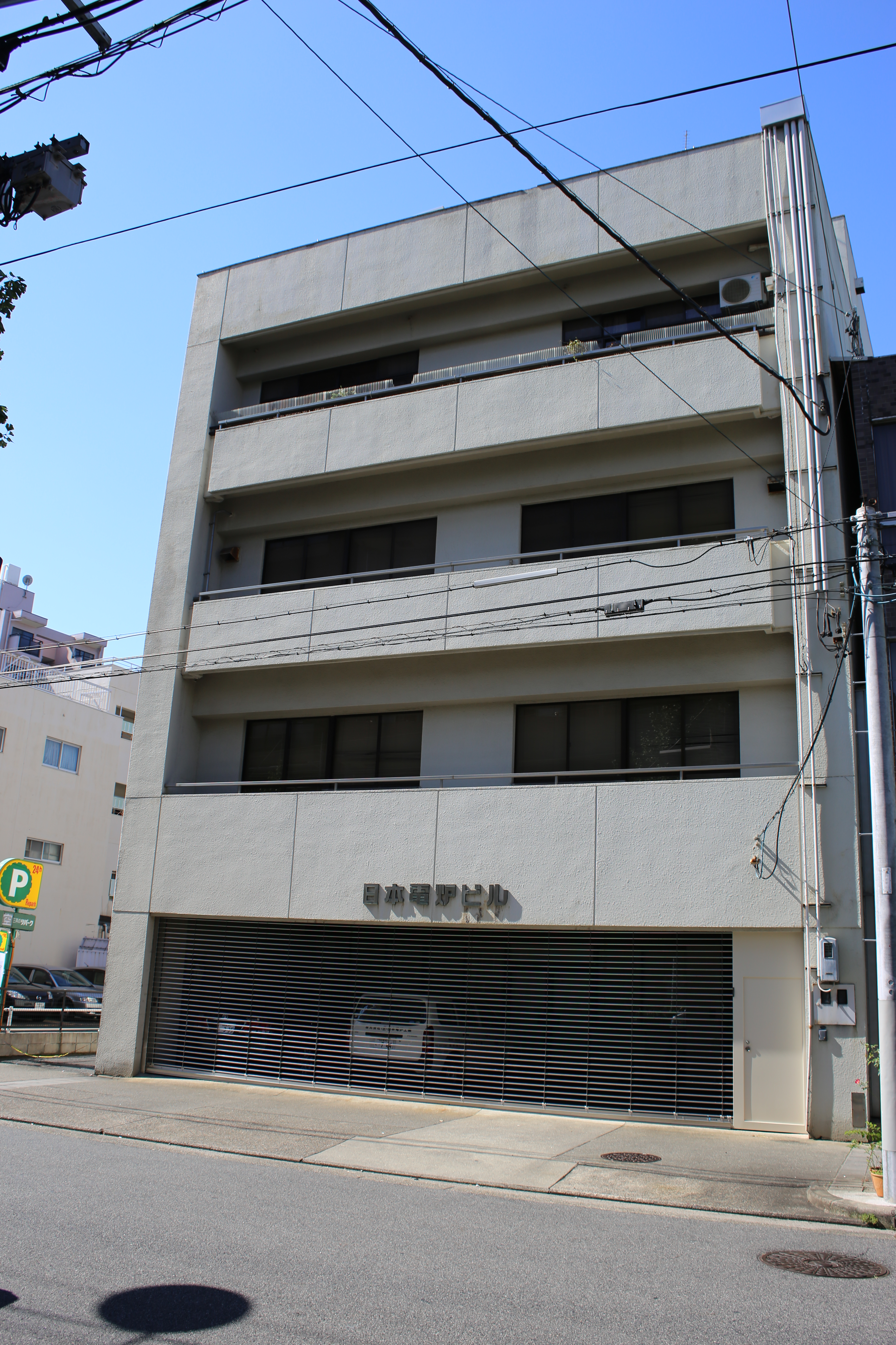 名古屋市中区上前津一丁目の日本電炉工業本社を東側公道北側より撮影